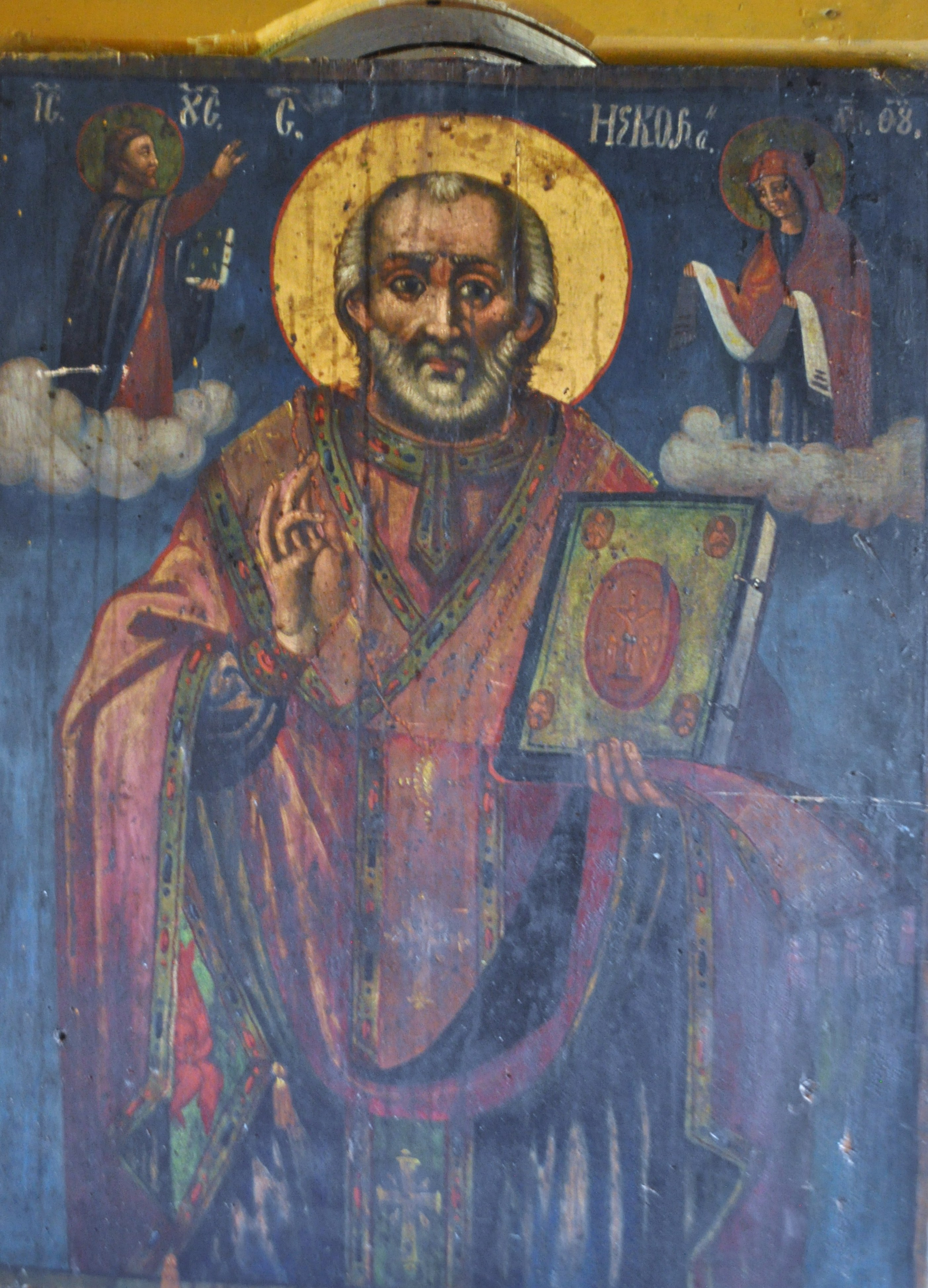 Biserica de lemn „Cuvioasa Paraschiva” din satul Valea Sării, județul Vrancea